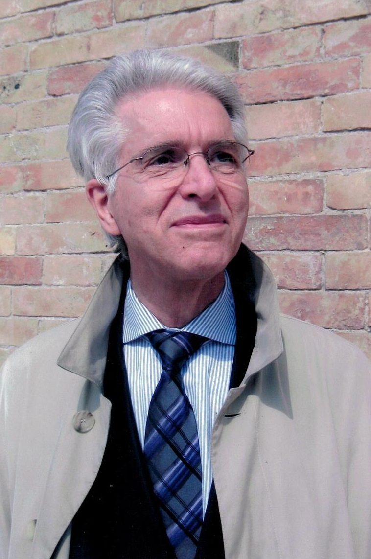 Foto von Hermes Andreas Kick